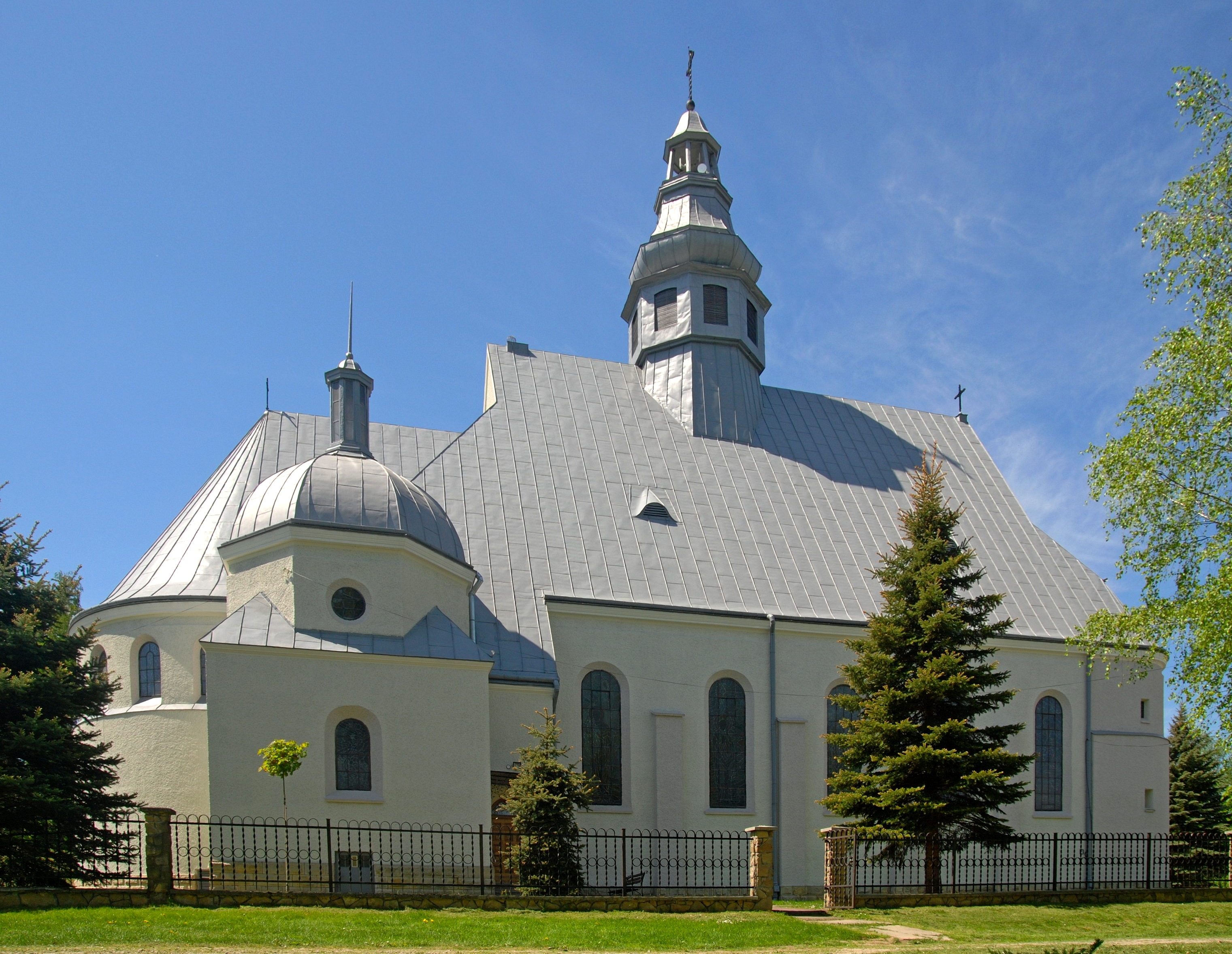 wieś Bączal Dolny